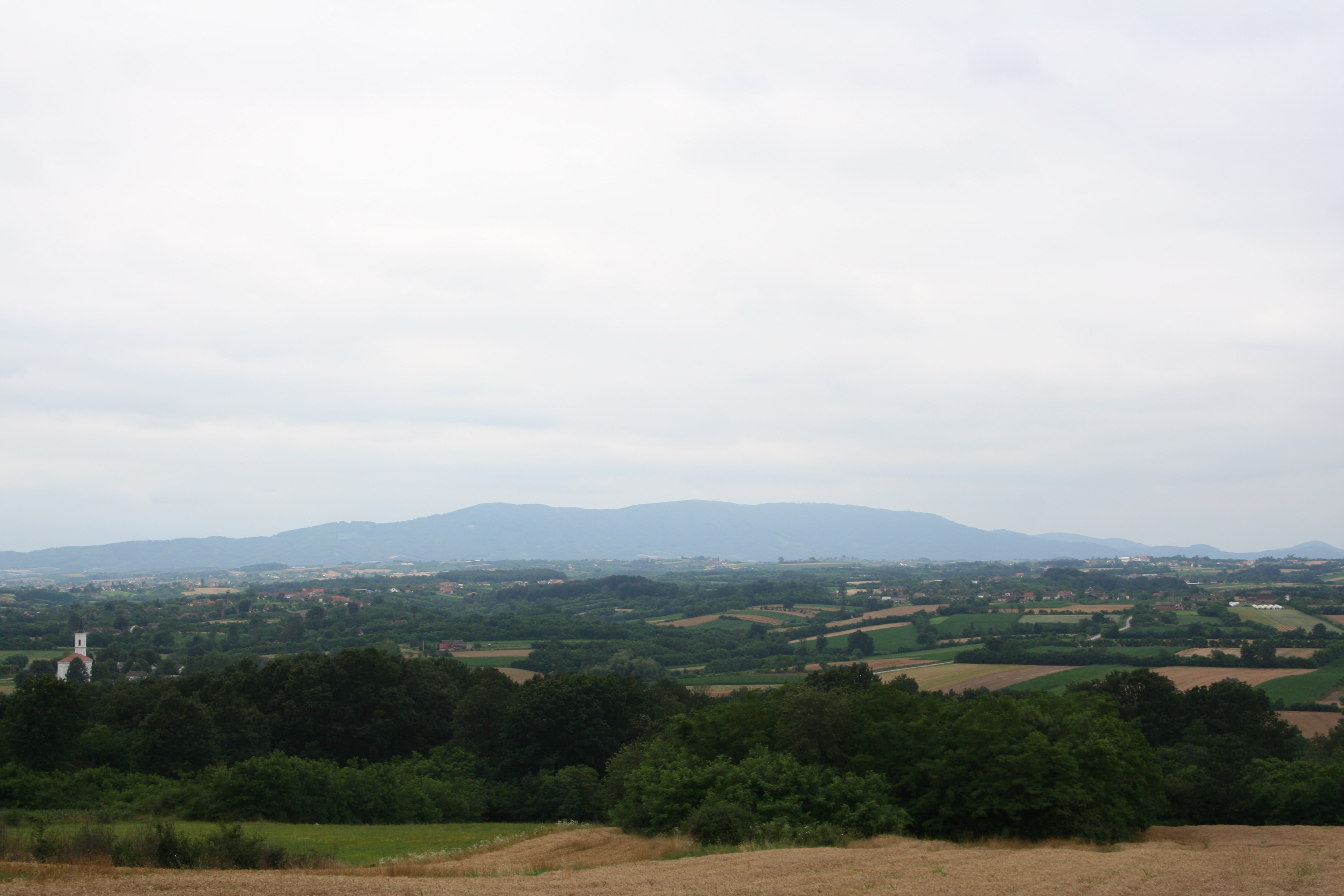 Panorama Nakučana sa planinom Cerom u pozadini